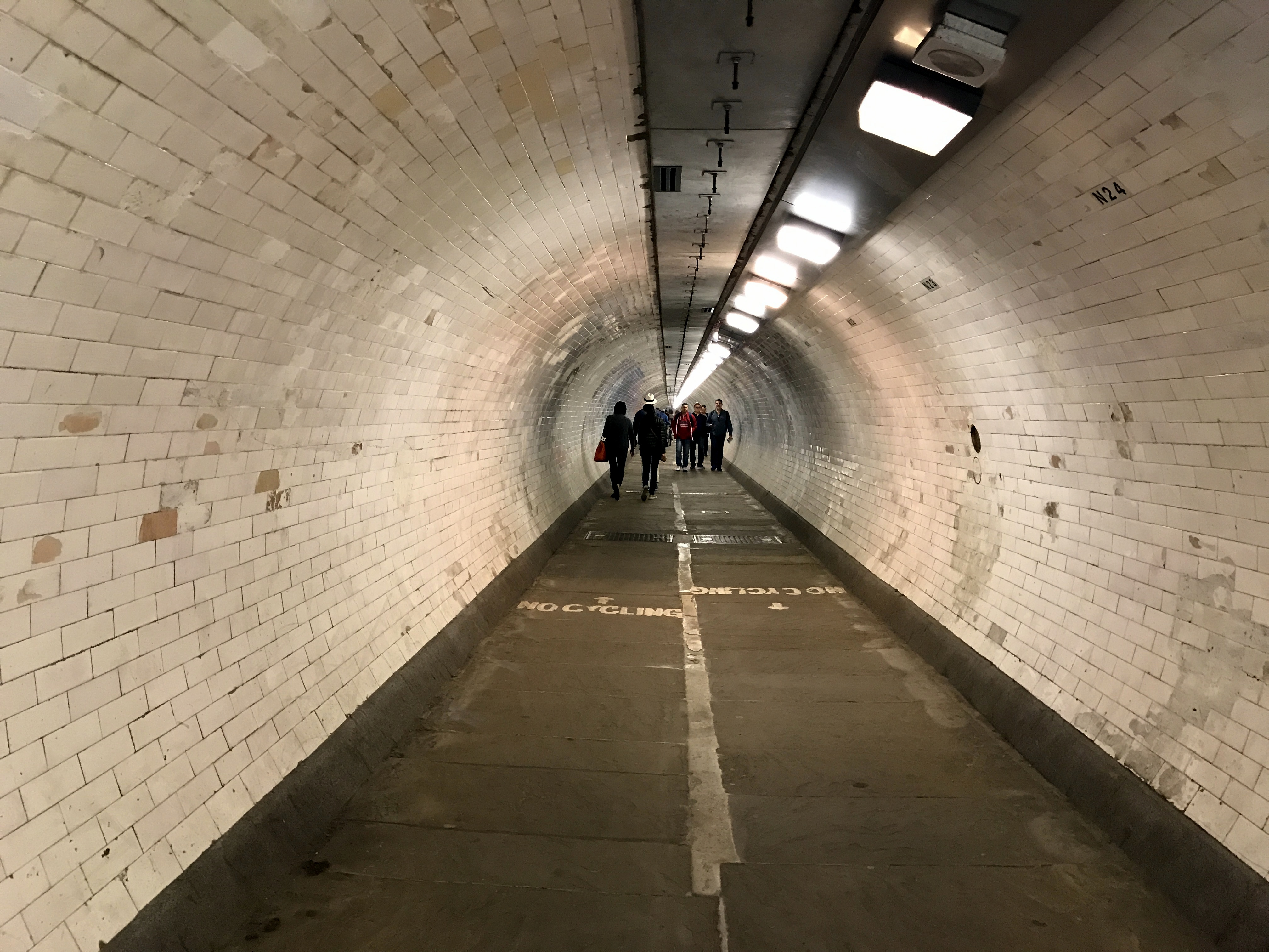 Greenwich foot tunnel